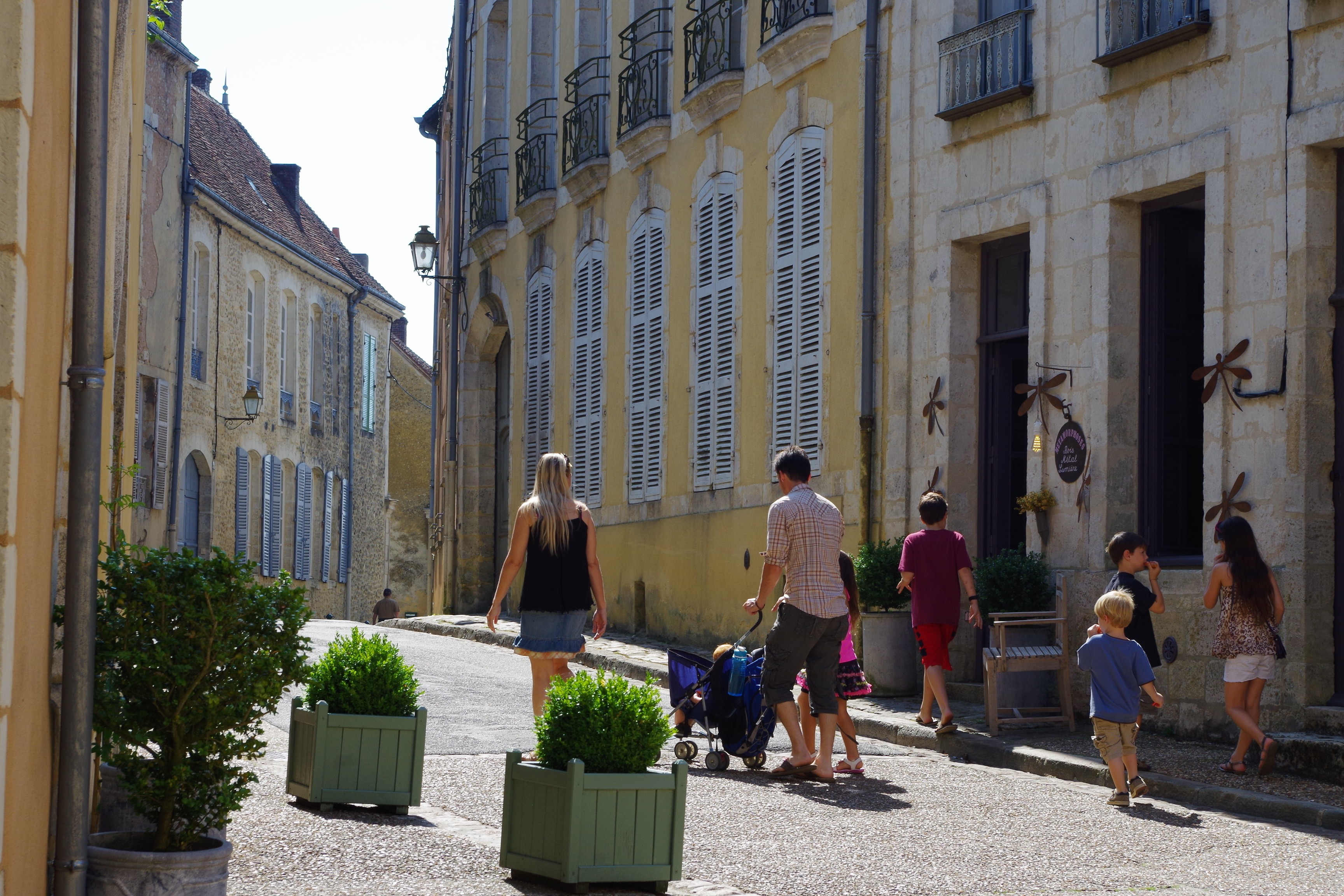 La rue ville close de Bellême est bordée de majestueux hôtels particuliers aux façades colorées